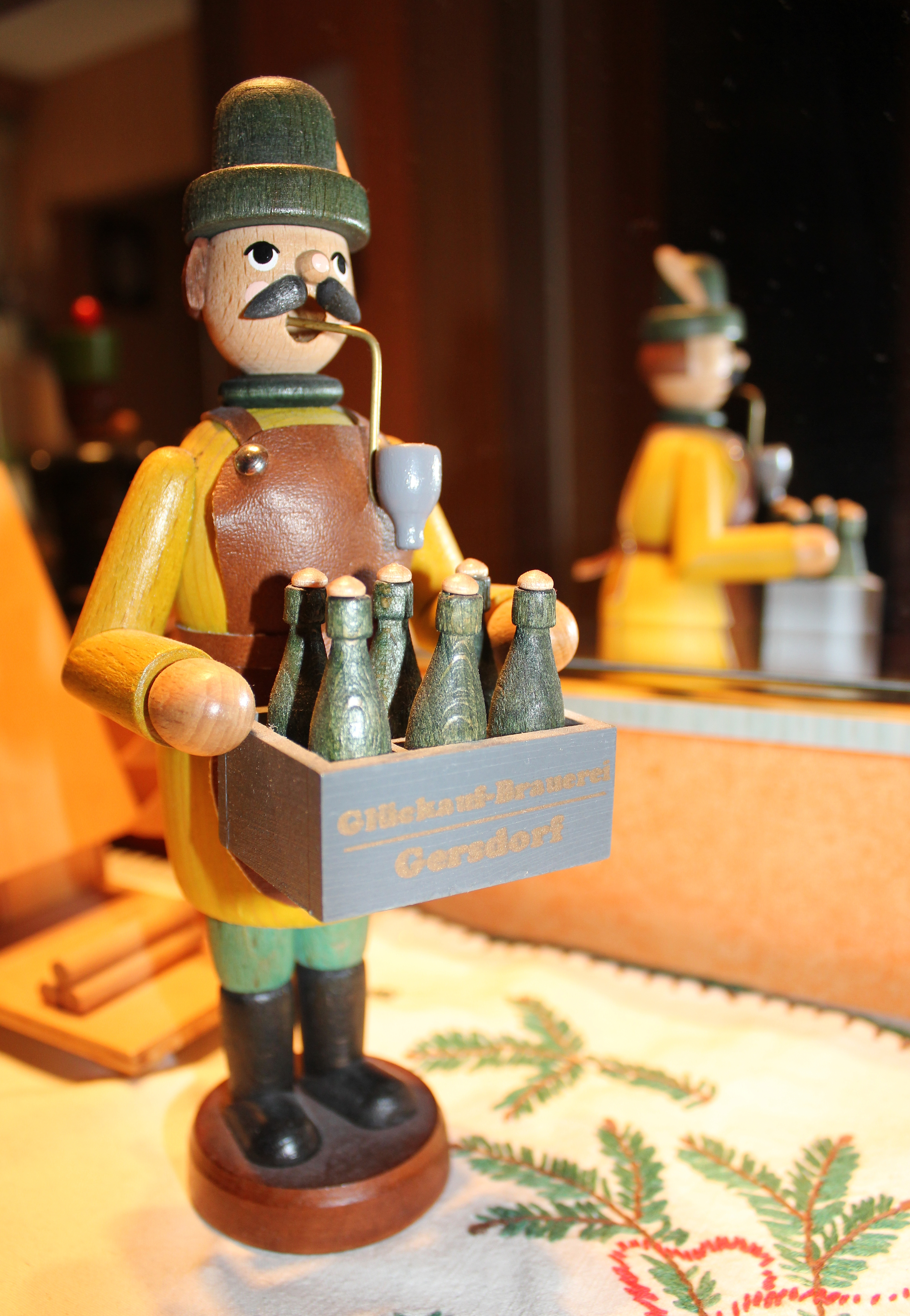 Räuchermann aus Gersdorf.Erzgebirgische Volkskunst. Sachsen.